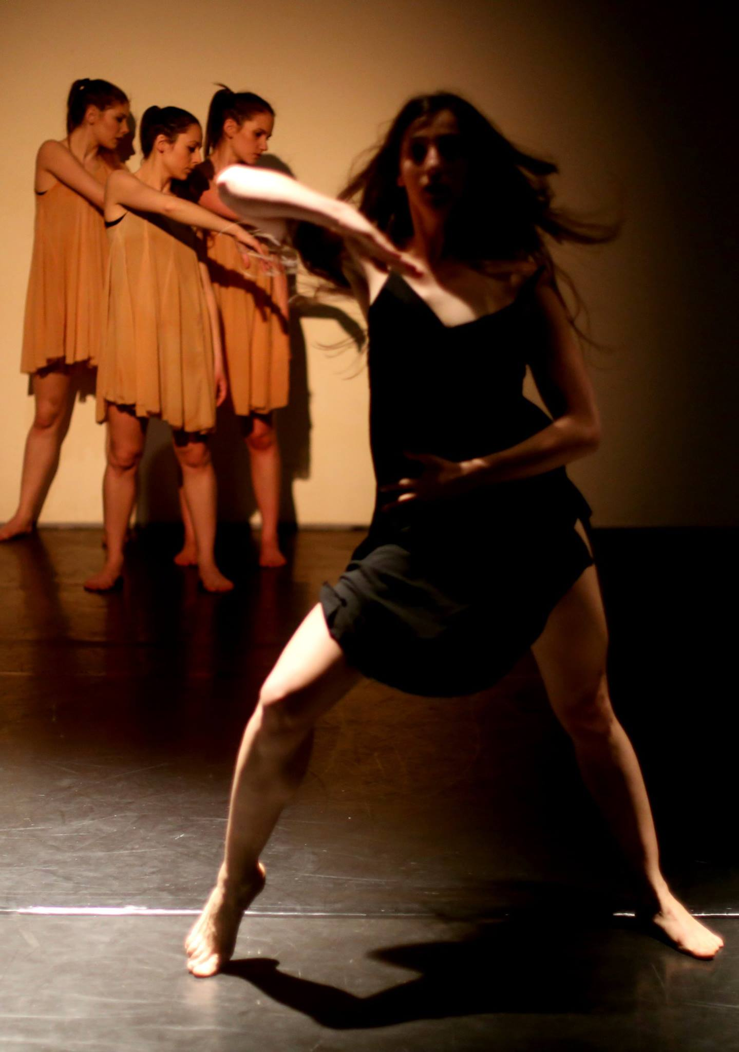 FEMME c. előadás